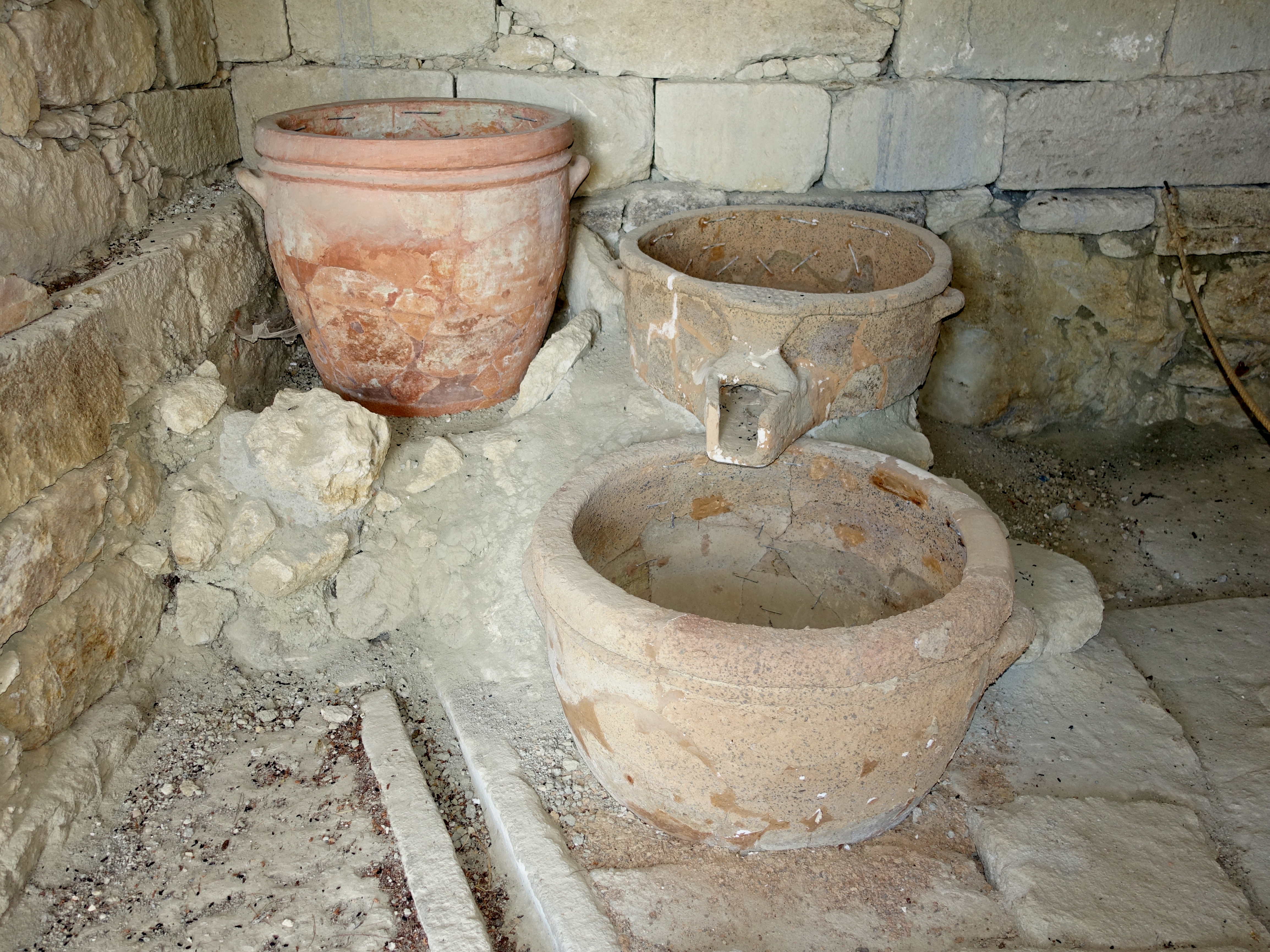 Weinpresse der „Villa“ von Vathypetro (Βαθύπετρο), Gemeinde Archanes-Asterousia, Kreta, Griechenland